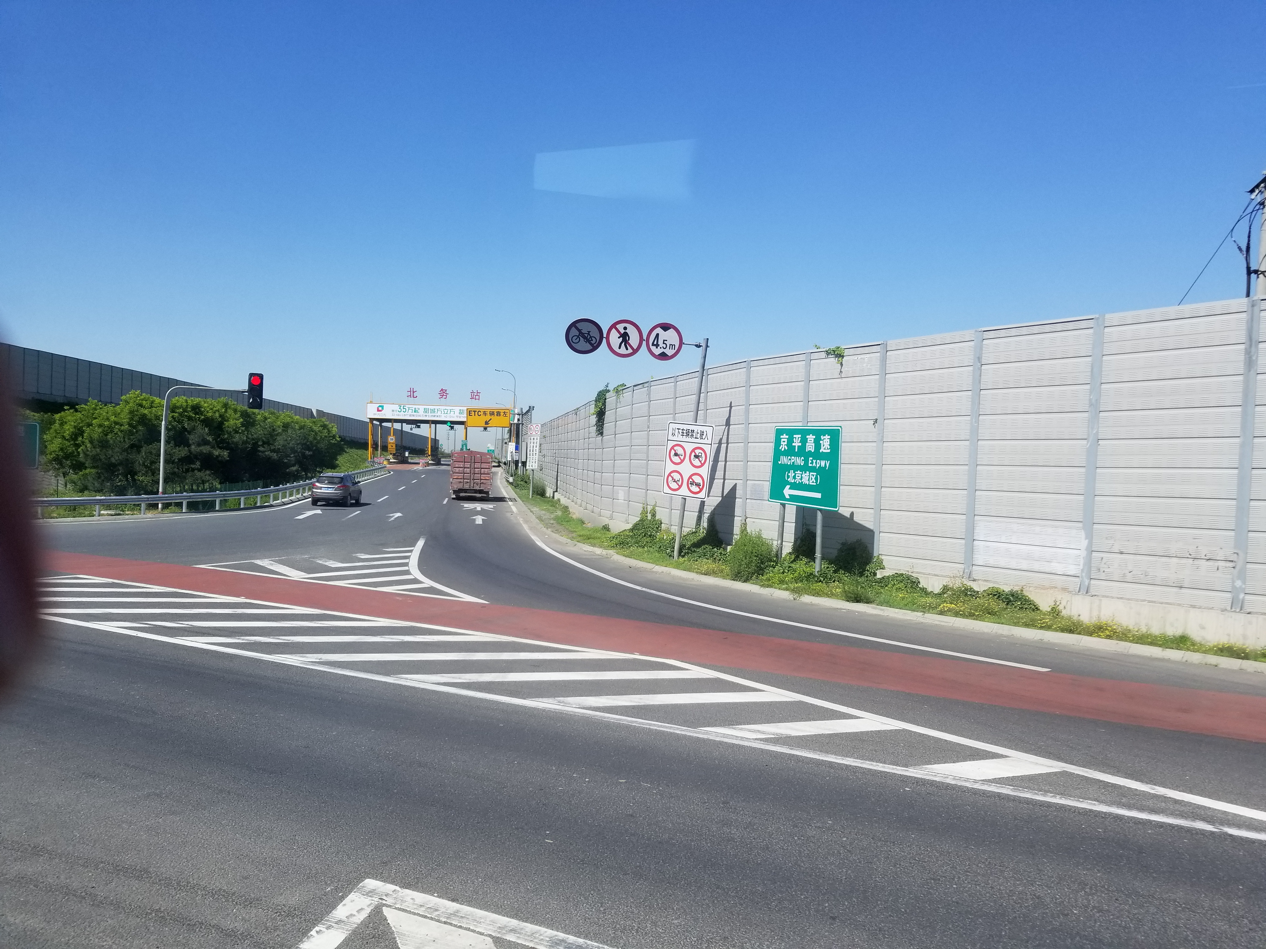 כניסה לכביש אגרה בסין